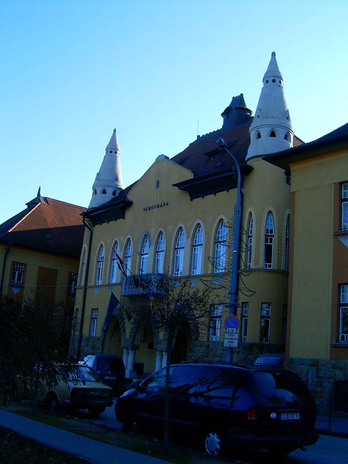 Budafok-Városháza